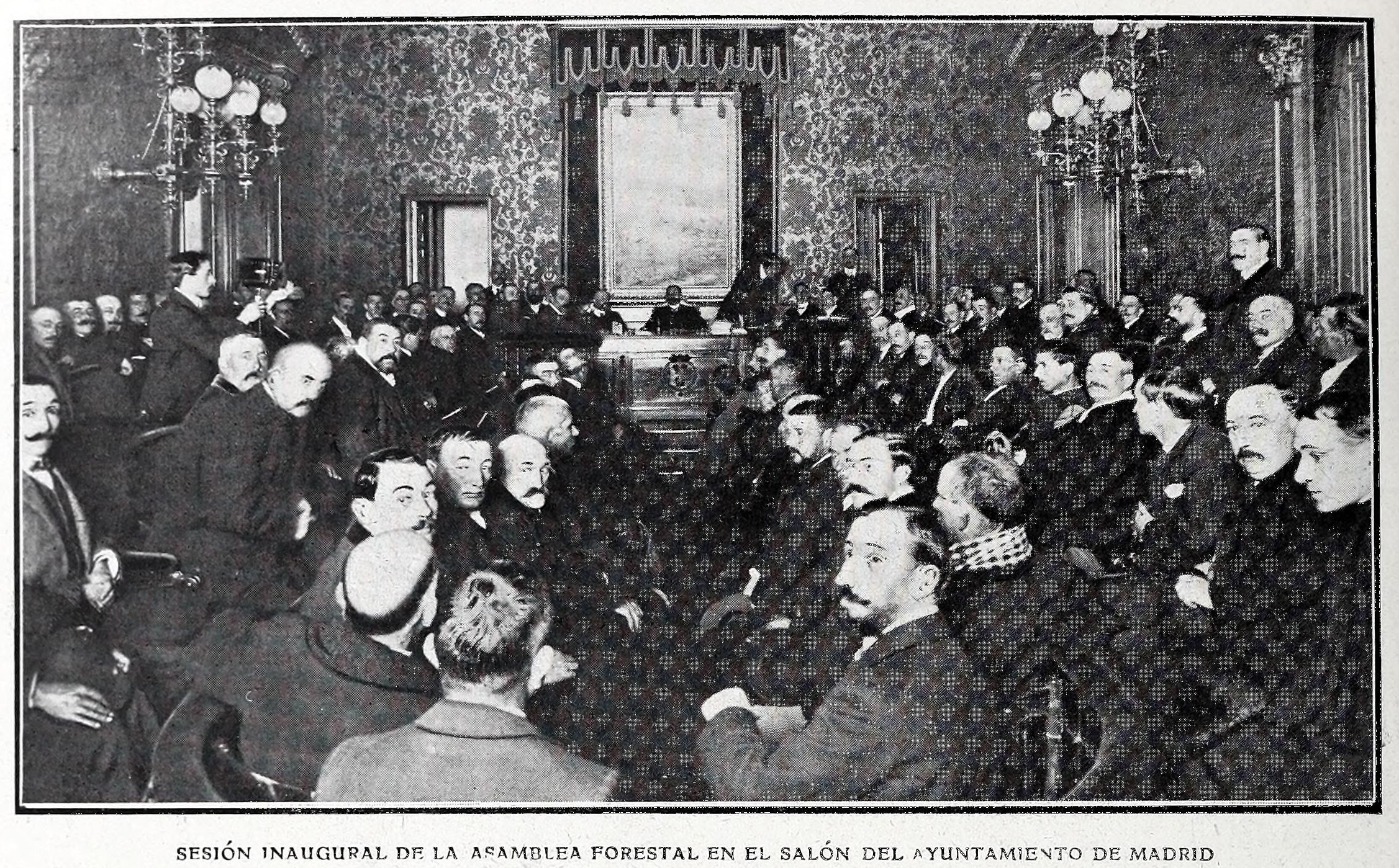 Sesión inaugural de la Asamblea Forestal en el salón del Ayuntamiento de Madrid.